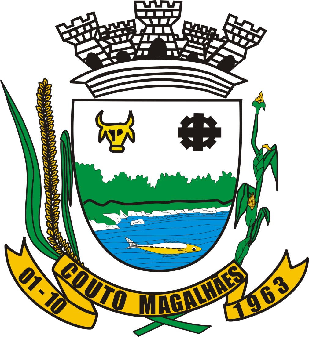 Brasão de Armas do município de Couto de Magalhães, Tocantins, Brasil.